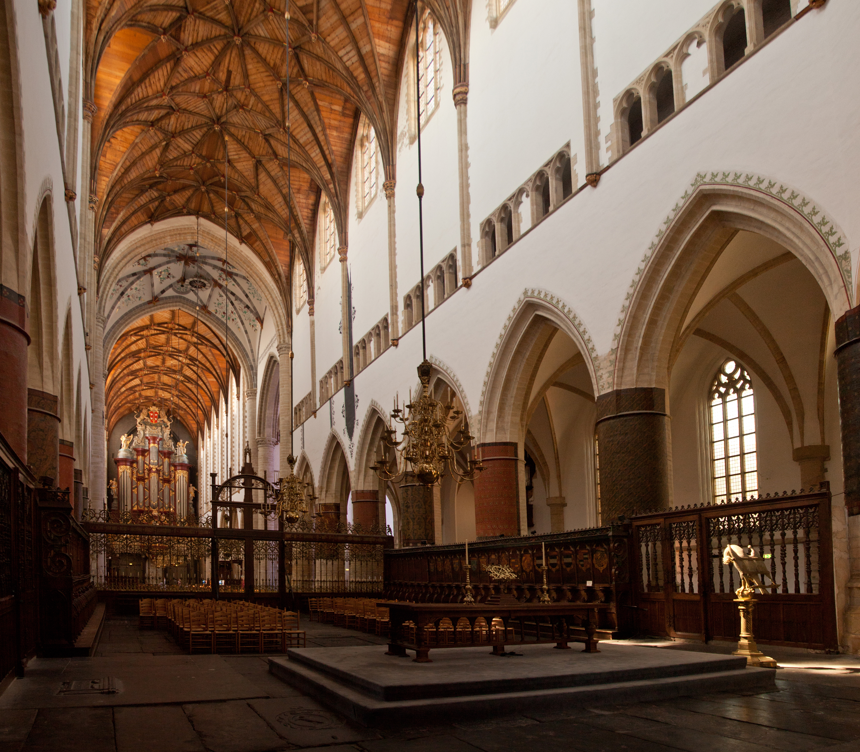 Interieur van de Grote of Sint Bavokerk te Haarlem